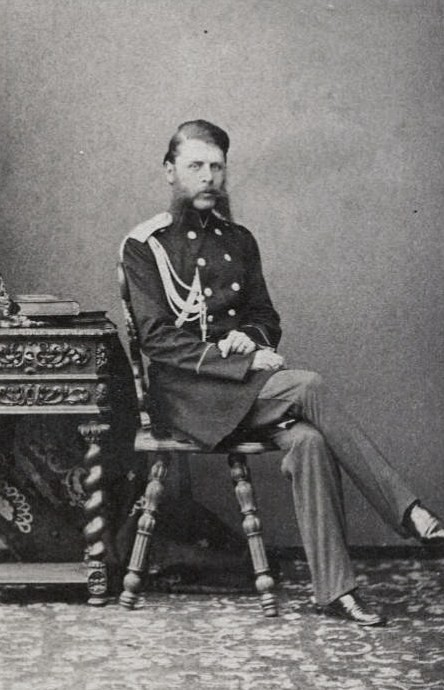 Граф Григорий Сергеевич Строганов (1829-1910)